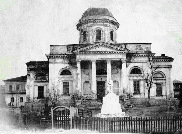 Станица Цимлянская Никольская церковь и памятник Сталину лето 1943